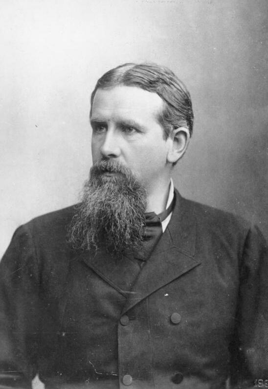 Prof. Friedrich Ratzel Ratzel, Friedrich Geograph [Prof. Friedrich Ratzel (1844-1904), Naturwissenschaftler, Geograf] Abgebildete Personen: Ratzel, Friedrich Prof.: Geograph, Deutschland ( GND 118598538 )